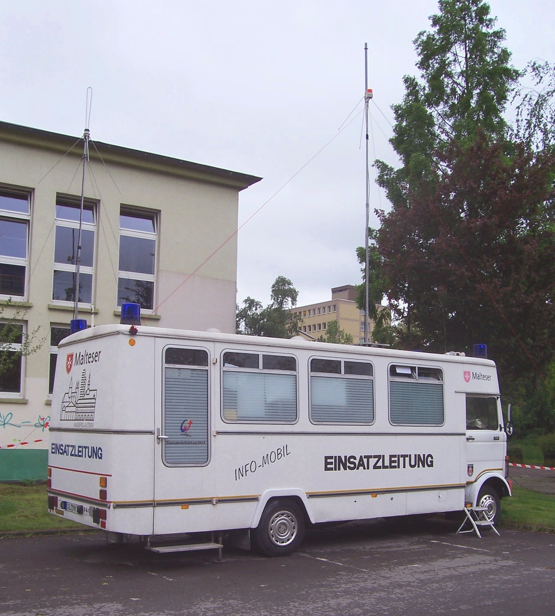 Einsatzleitwagen 2 der Führungsunterstützung des Malteser Hilfsdienstes aus Kaiserslautern